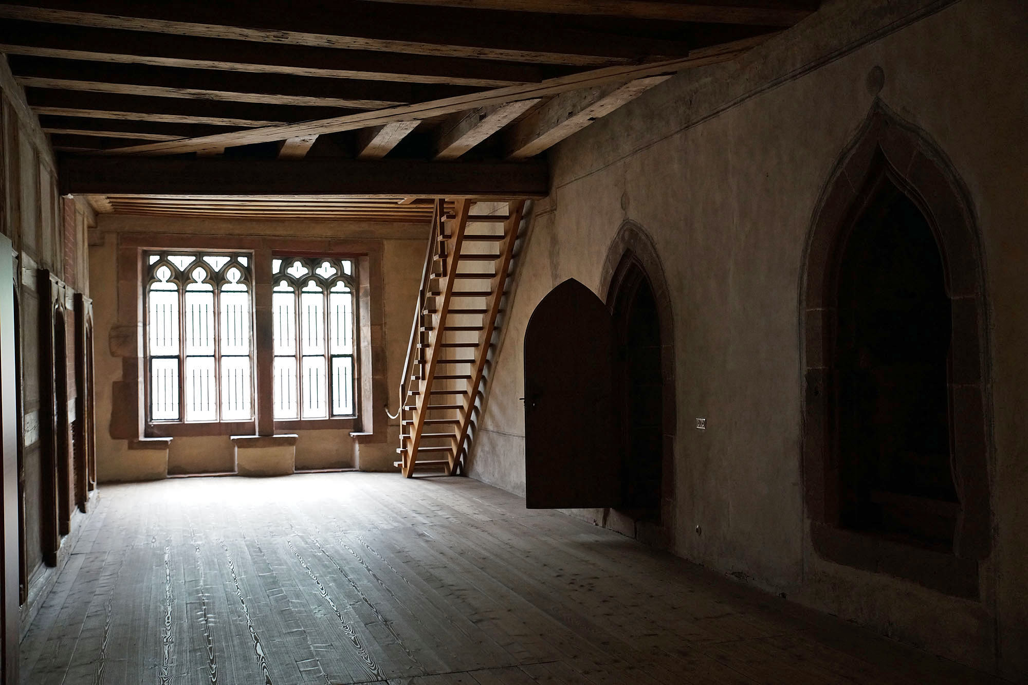 ALPIRSBACH: KLOSTER: und